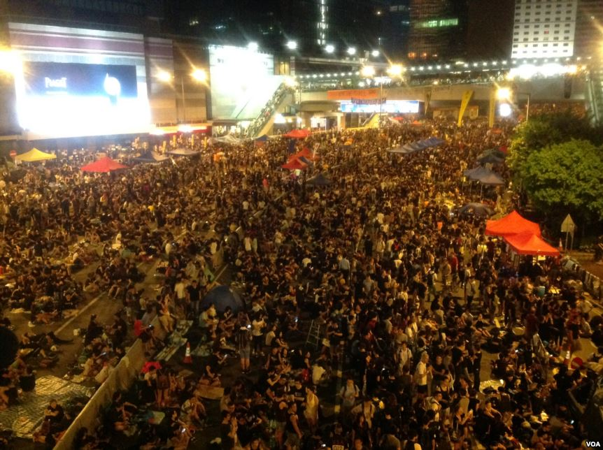 中文（台灣）: 數以萬計港人週三繼續參與街上佔據行動